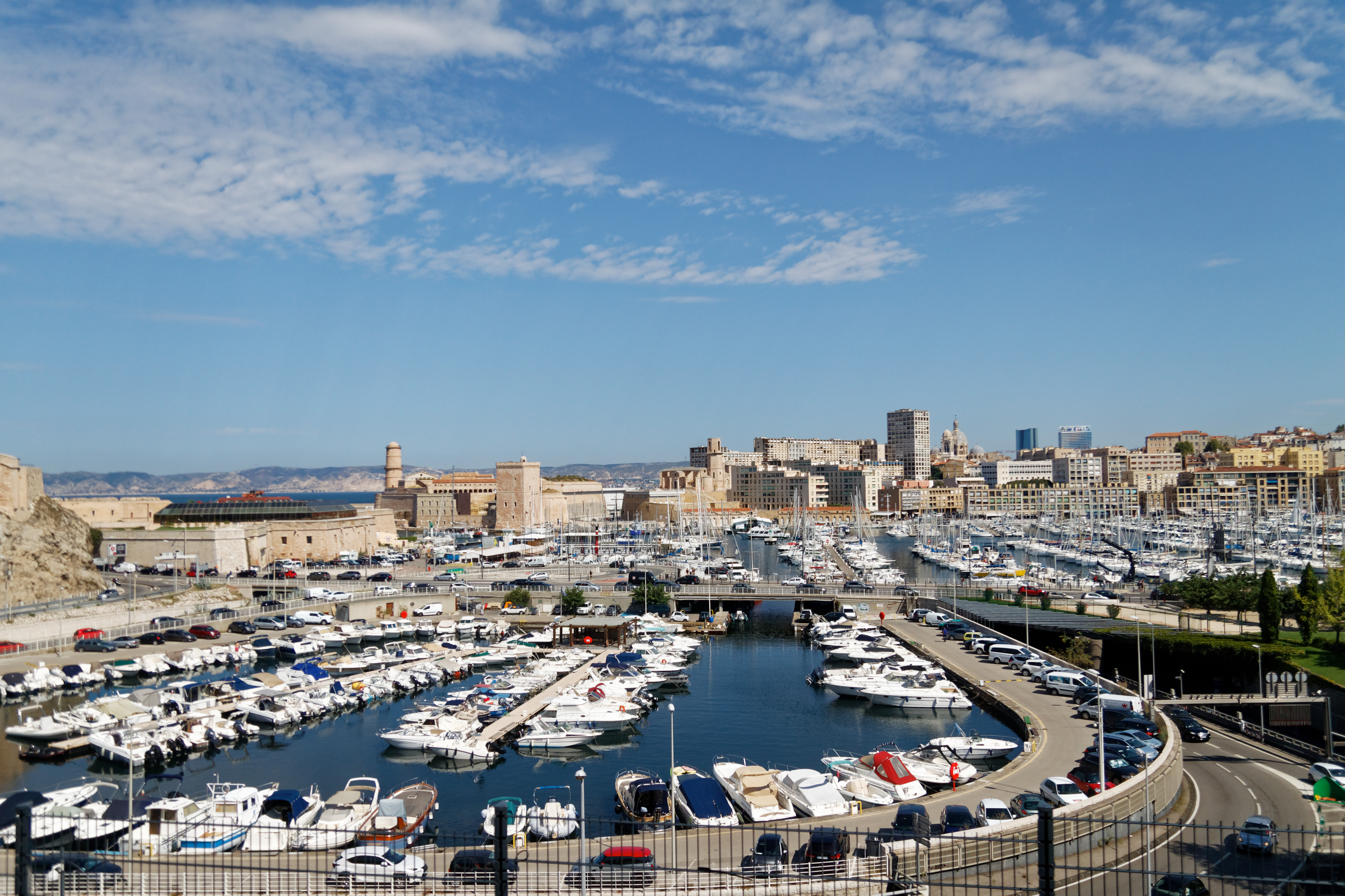 Alter Hafen (Vieux-Port) von Marseille, von Saint-Victor aus gesehen